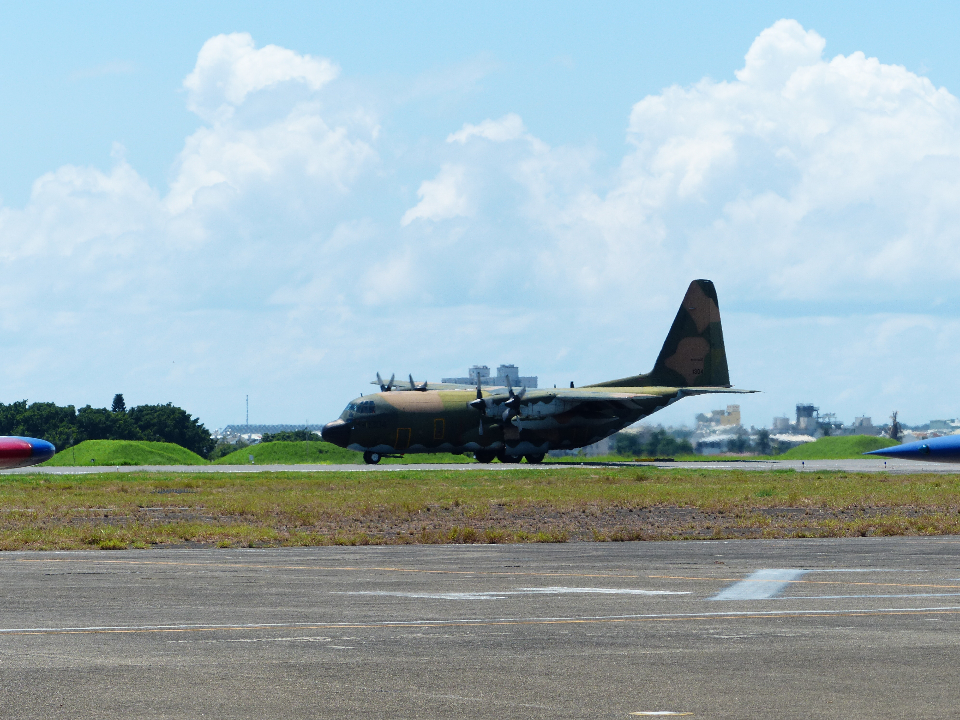 降落臺南空軍基地跑道滑走中的中華民國空軍C-130H 1304。